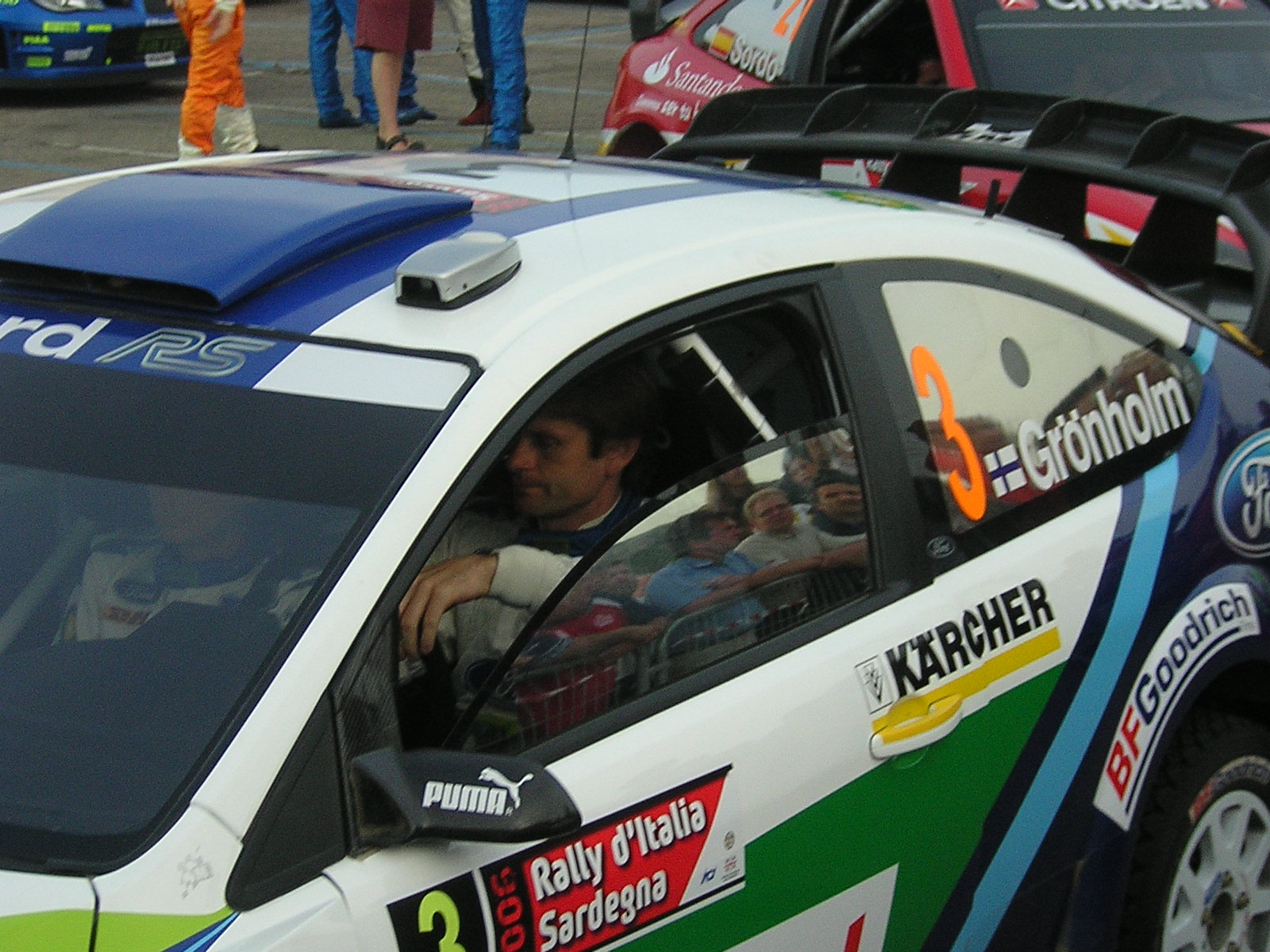 Marcus Gronholm, Rally di Sardegna 2006 Foto scattata da me.